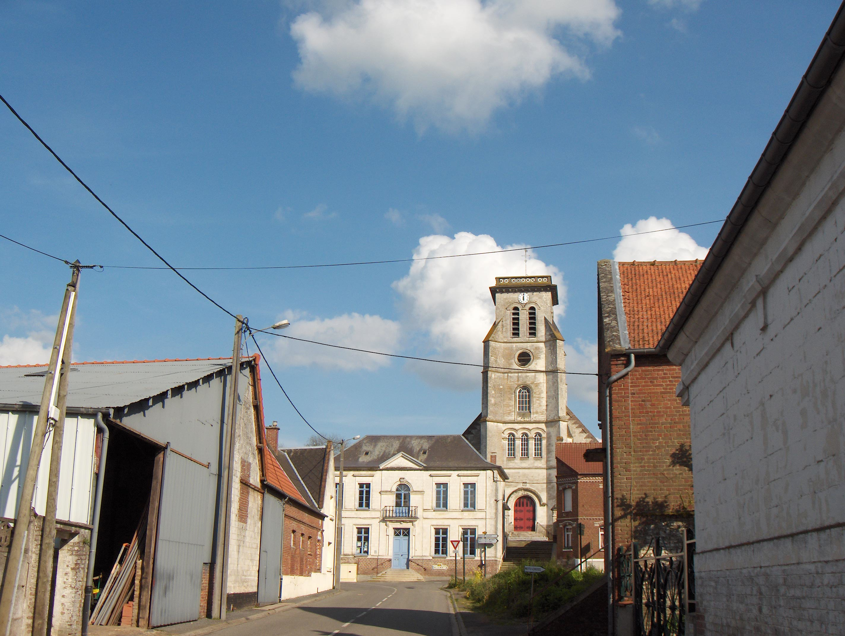 Gouy-en-Artois (dépt. Pas-de-Calais, France), église Saint-Amand (XVIIe siècle, tour du XIXe siècle), vue de la rue de Fosseux